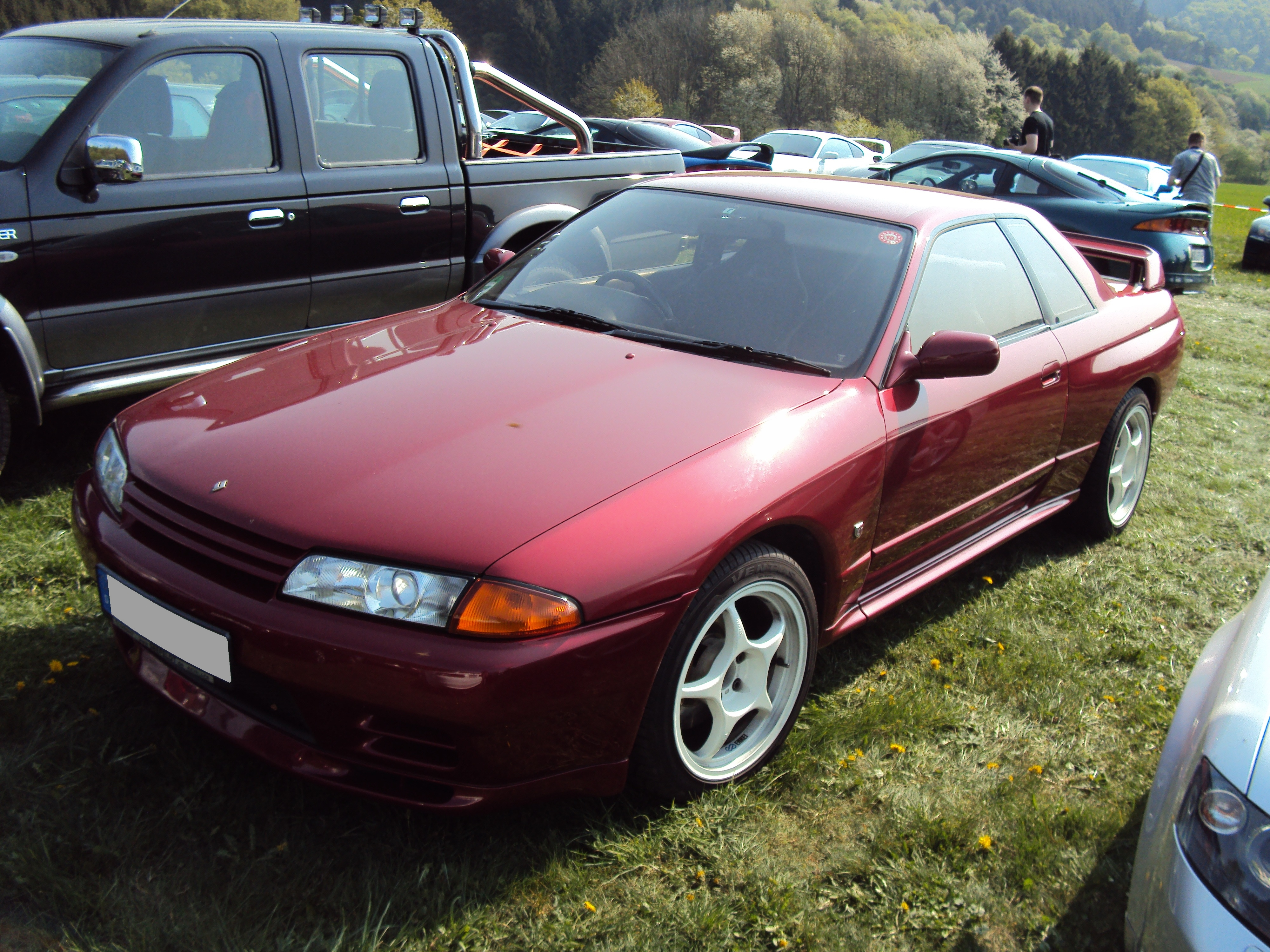 Nissan Skyline R32 GT-R. Fotografiert nahe der Nürburgring Nordschleife am Carfreitag 2011.